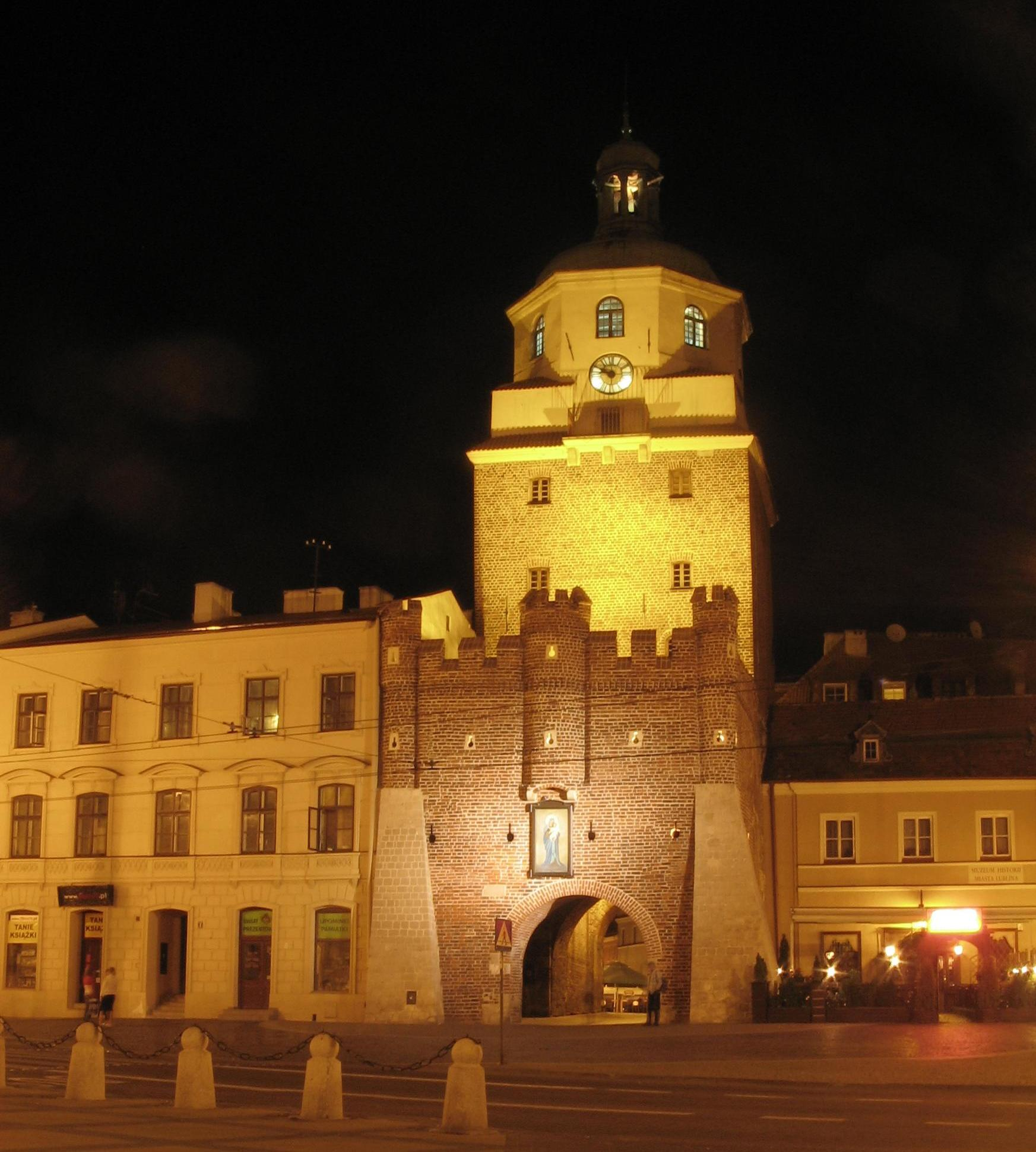 Brama Krakowska w Lublinie.